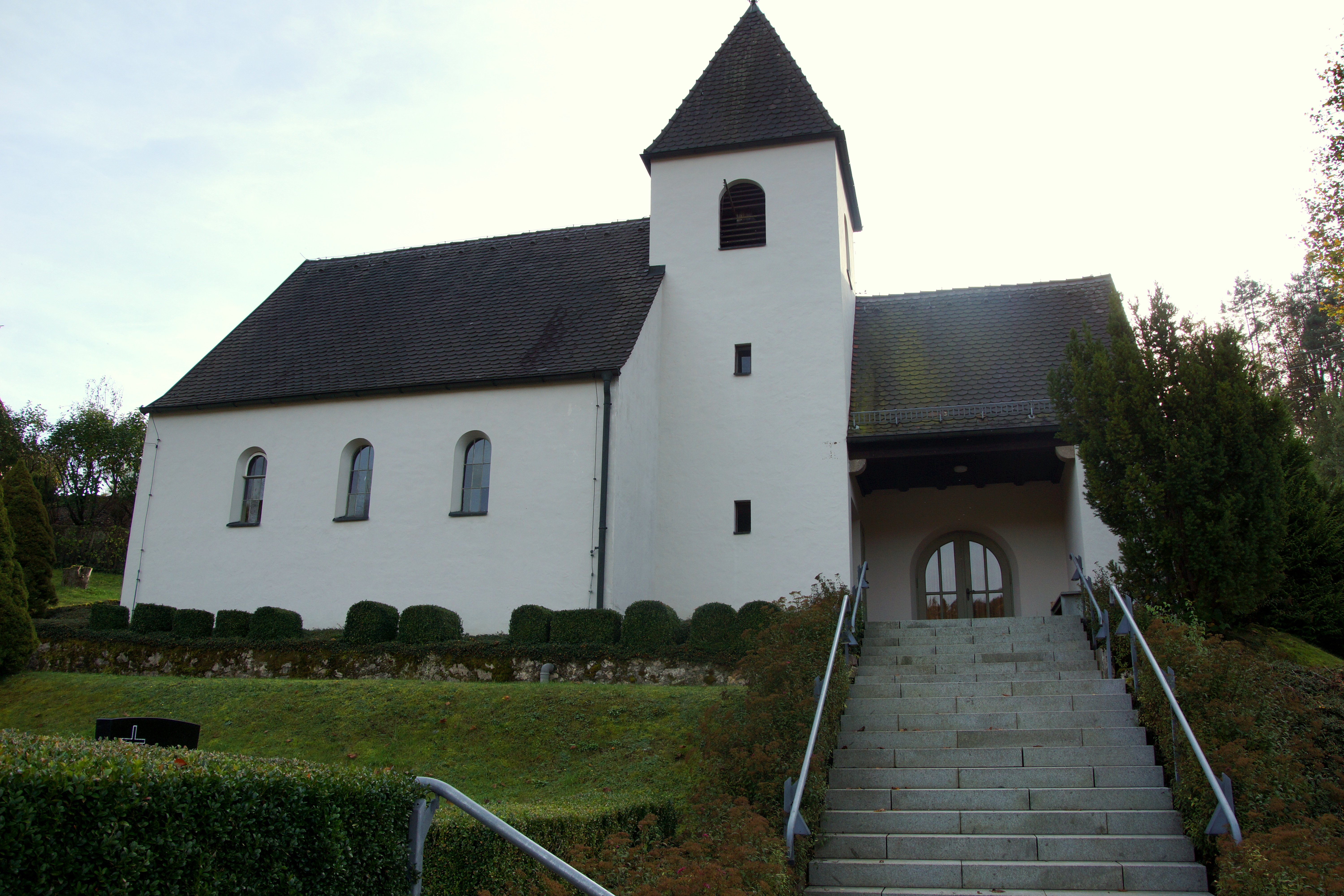 Die evangelische Vikariatskirche St. Johannes (Johanniskirche) in Högen bei Weigendorf